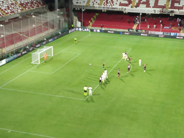 Kiyine si accinge a battere il rigore che vale il gol della Salernitana nella gara interna col Chievo finita 1-1 nella stagione 2019-2020 (Serie B)